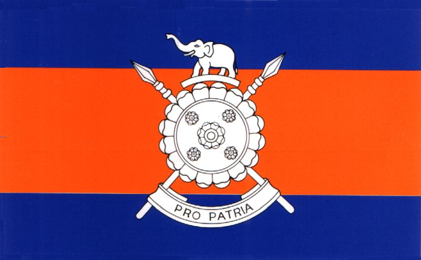 Первый флаг армии Цейлона с 1949-1966